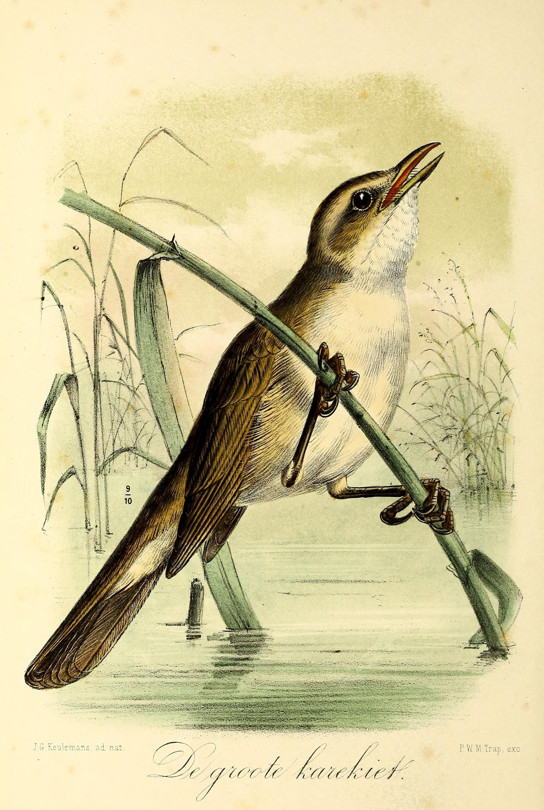 J G Keulemans ad. nat. r/ïvr /e P.W.M.Trap exc